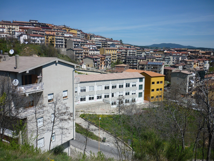 San Giovanni in Fiore - urbanizzazione anni '70 e '80 Categoria:San Giovanni in Fiore